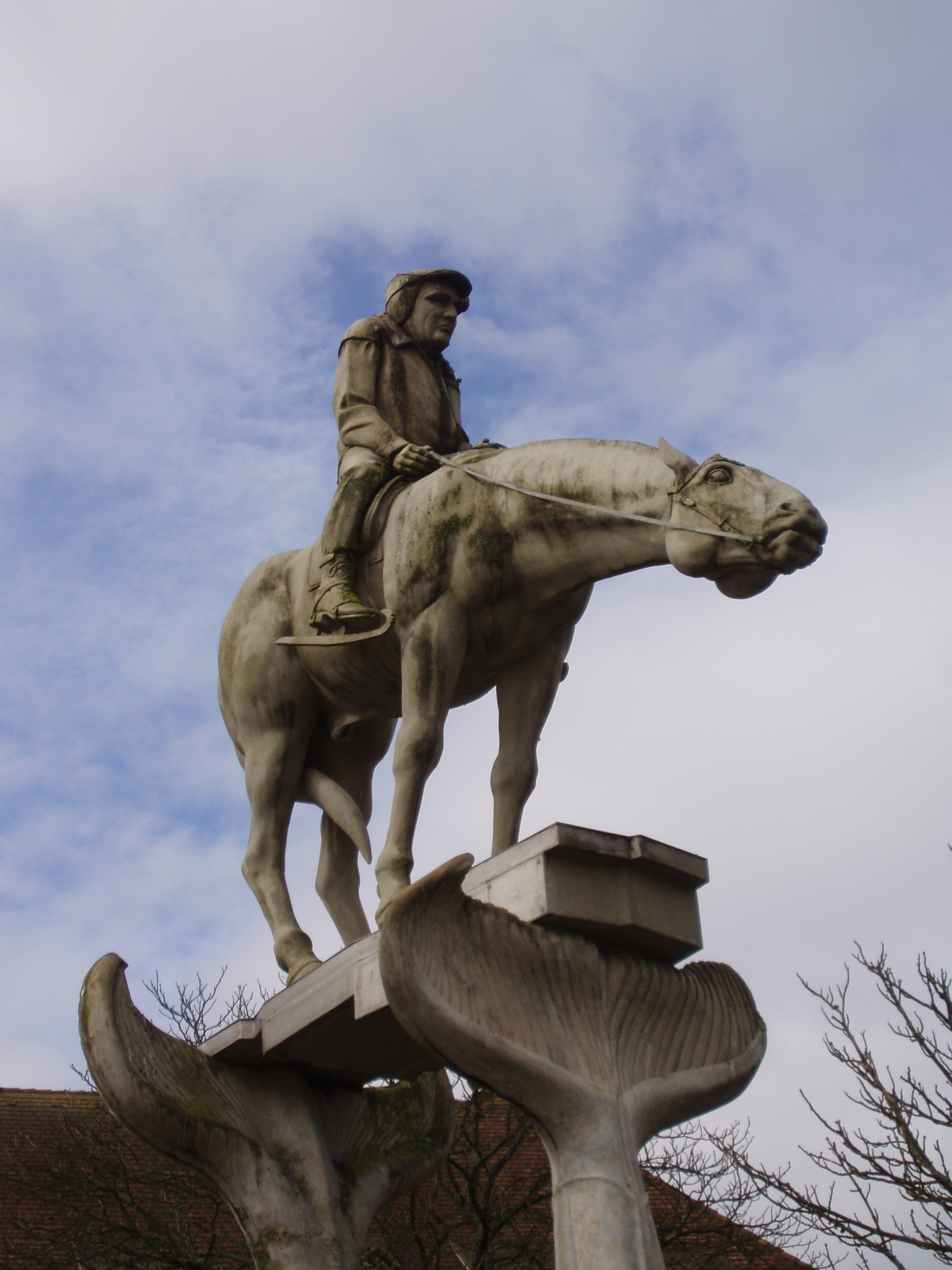 Detail des Brunnens Bodenseereiter von Peter Lenk in Überlingen